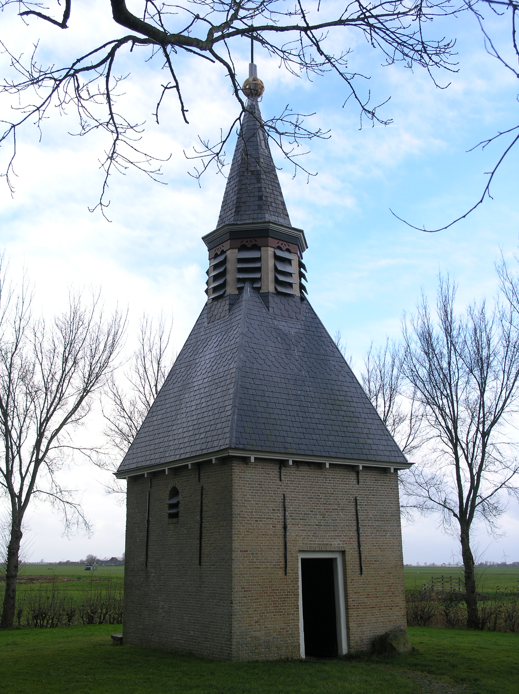 Greonterp Klokhuis